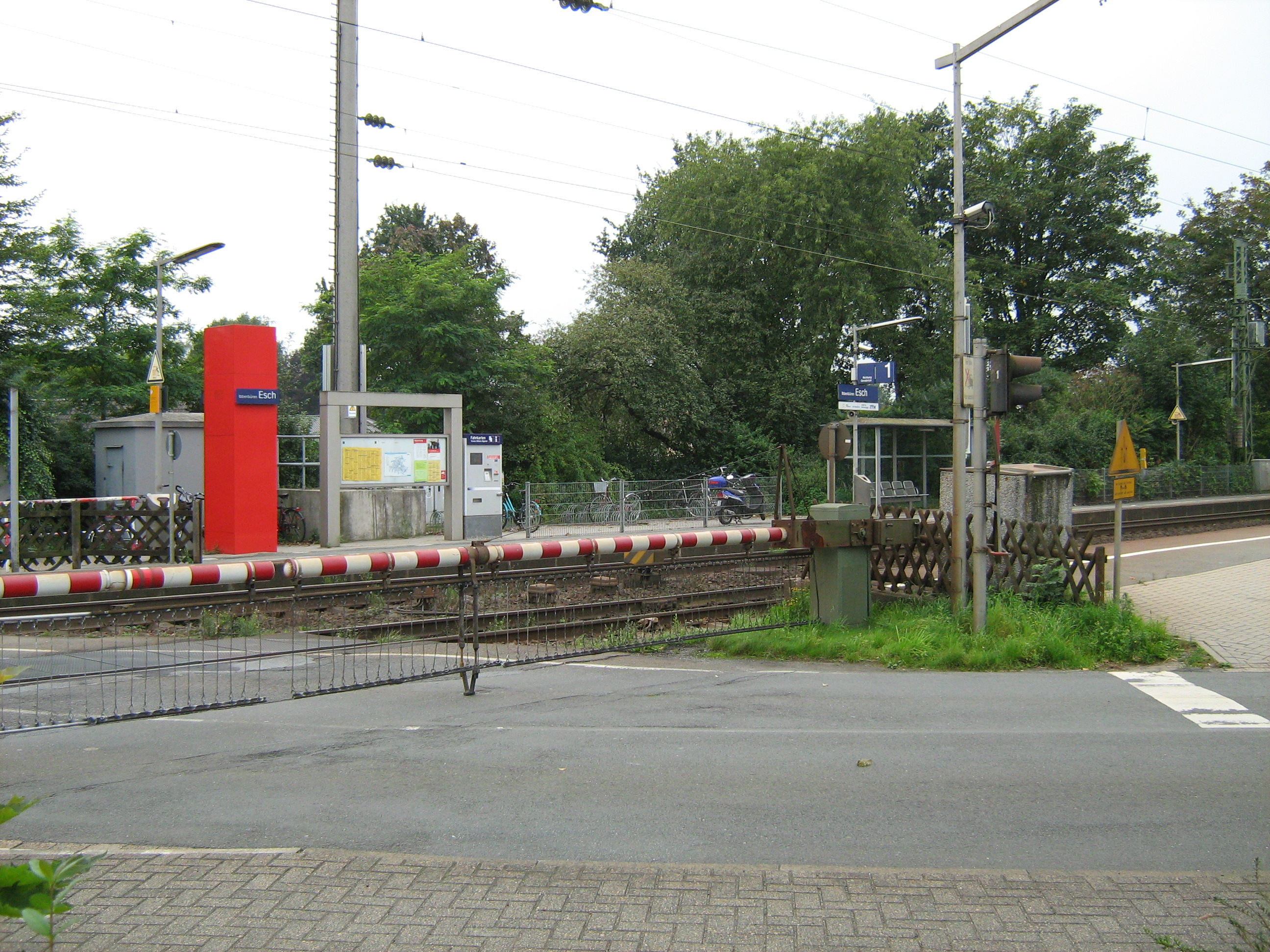 Haltestelle + Bahnübergang der Stadt Ibbenbüren im Ortsteil Esch